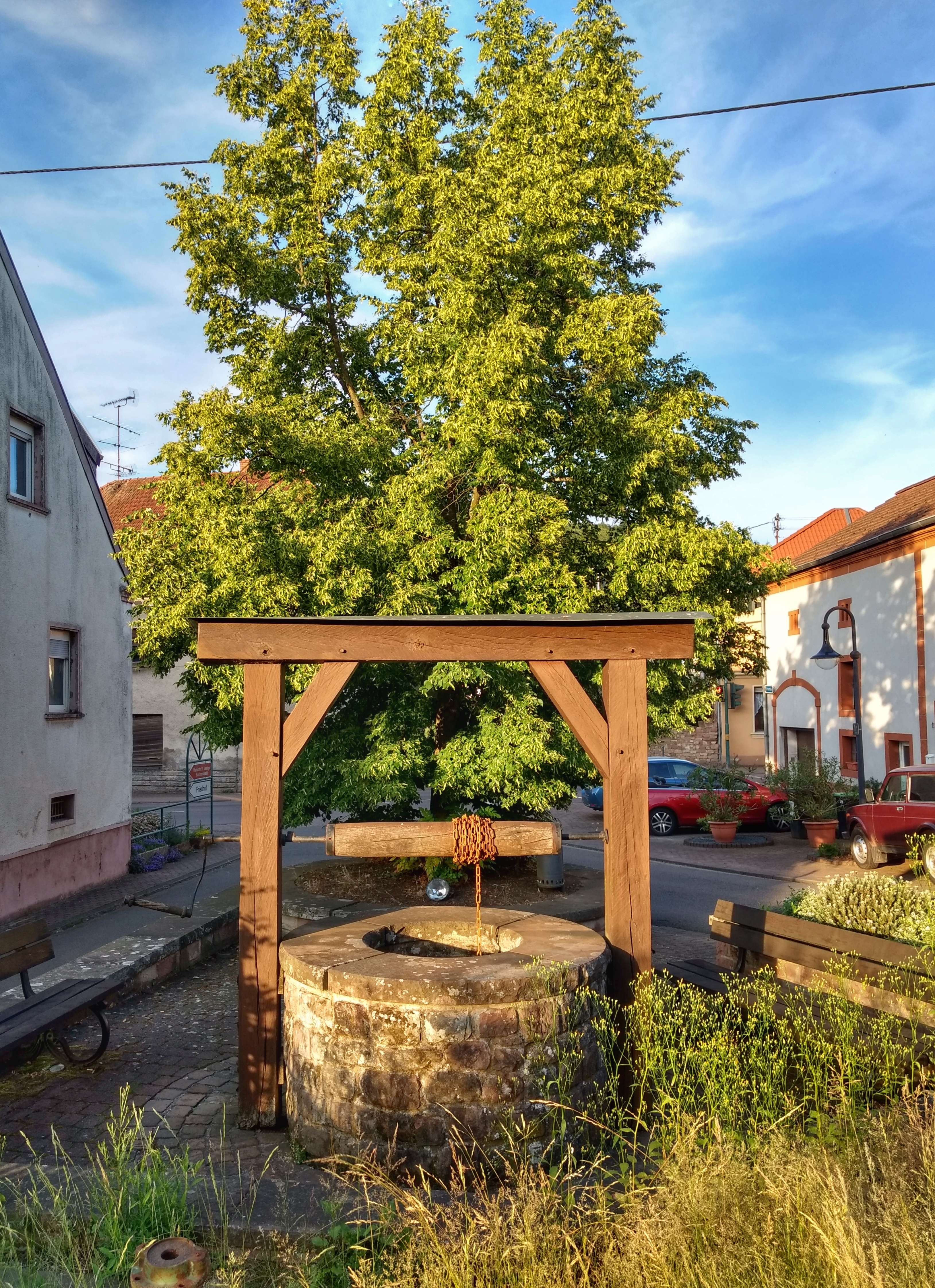 Ortsansicht Düppenweiler